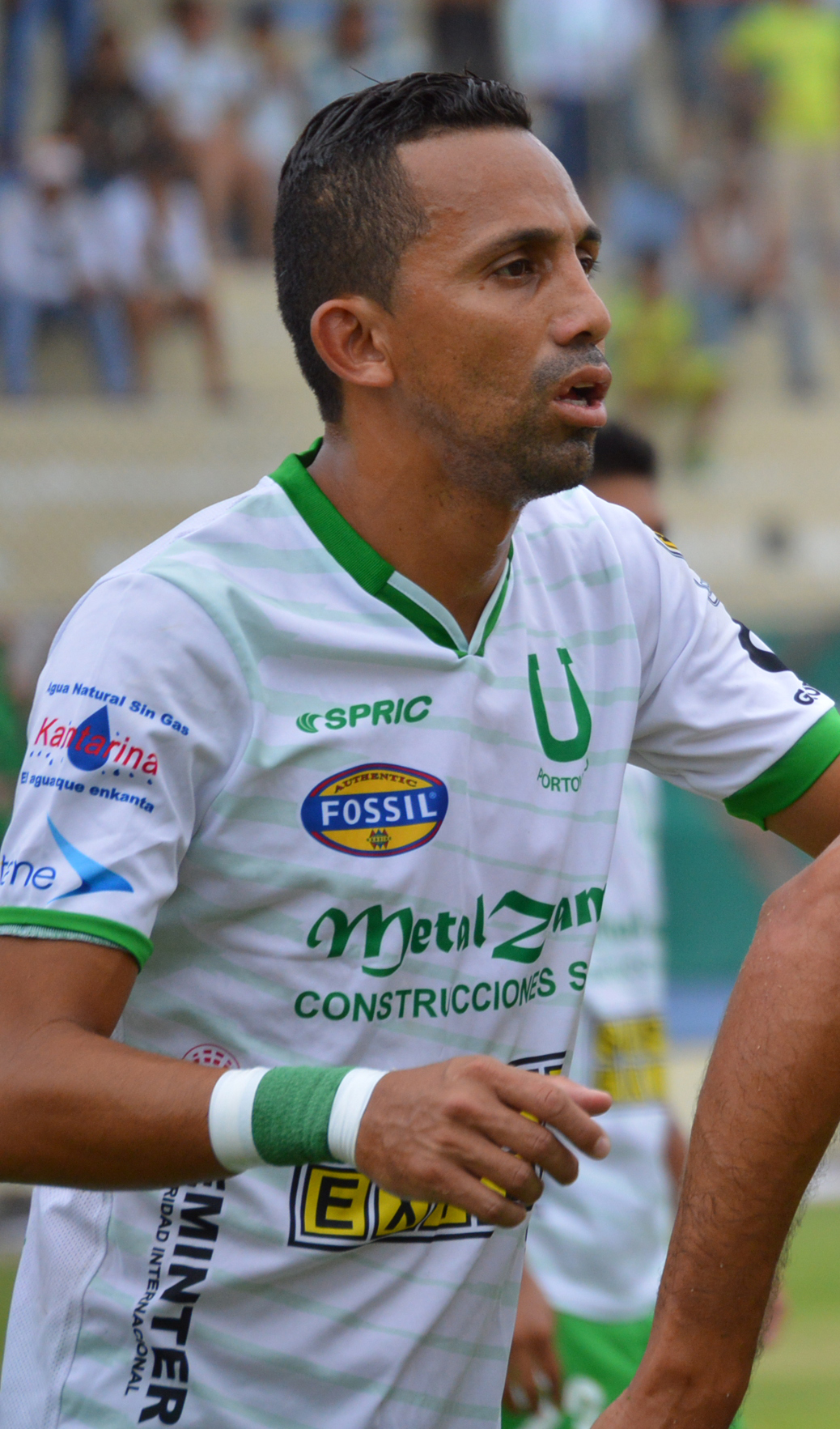 Kelvin Castro en Liga de Portoviejo - 2014